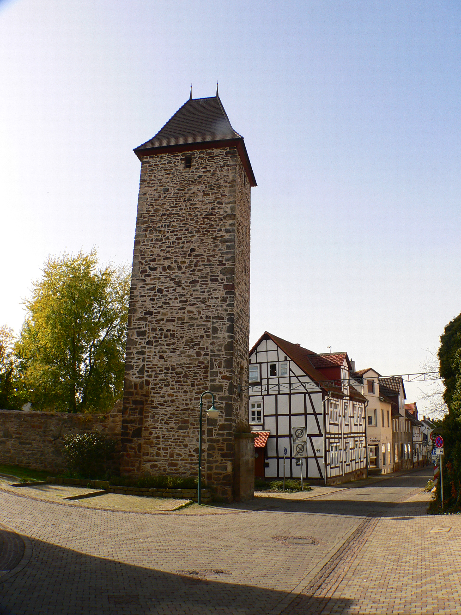 Eulenturm und Stadtmauer in Immenhausen im Landkreis Kassel, Hessen, Deutschland